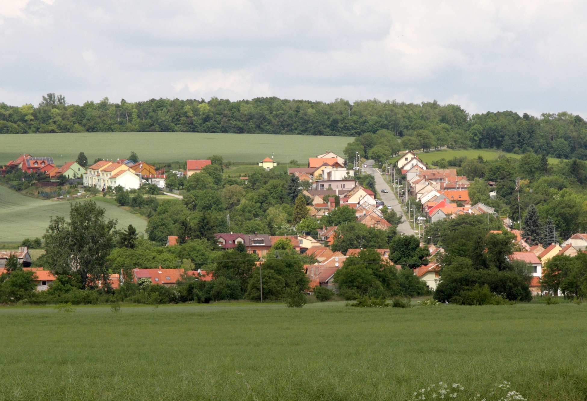 Zbýšov (okres Vyškov) - pohled od jihovýchodu.